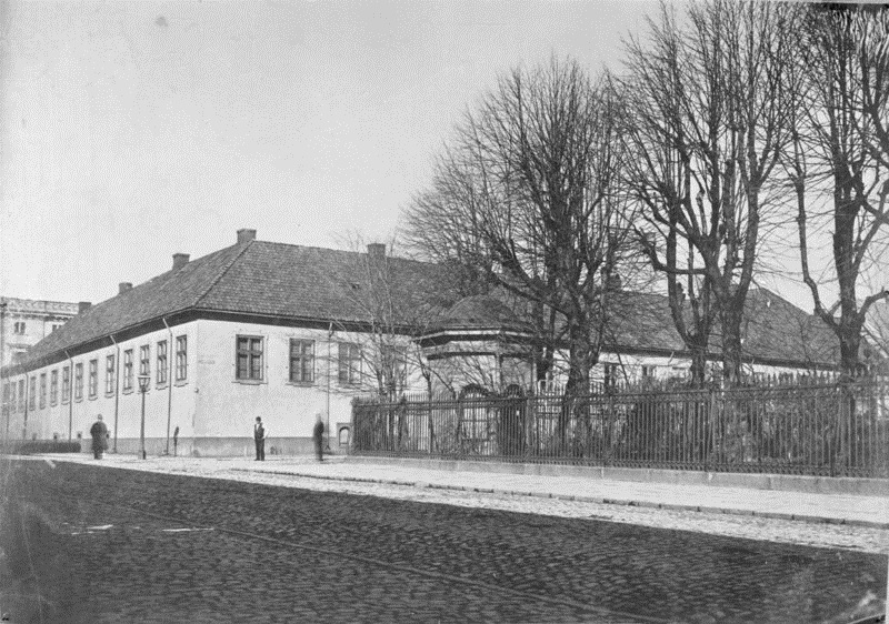 Paléet med paviljong i Paléhaven fotografert ca.1890